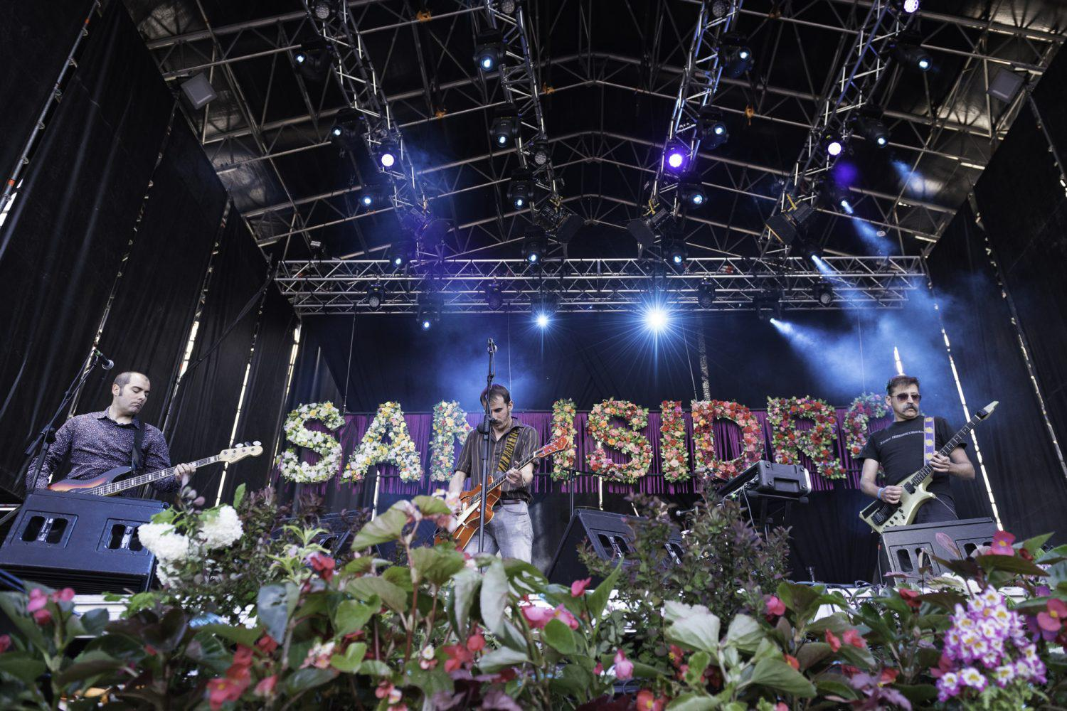 La noche del domingo arrancaba en las plazas de Madrid en calles y plazas con danza y poesía muy contemporánea. Más tarde los grandes escenarios se llenaban de música de gran diversidad para invitar a celebrar a toda la ciudadanía.